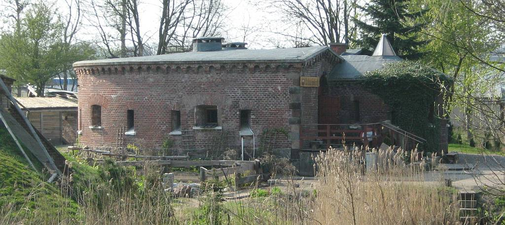 Kołobrzeg. Reduta Solna.